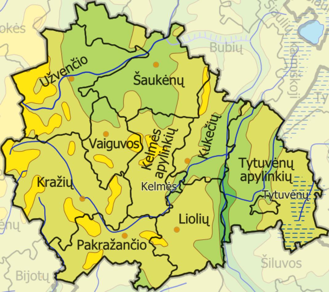 Староства Кельмеского района